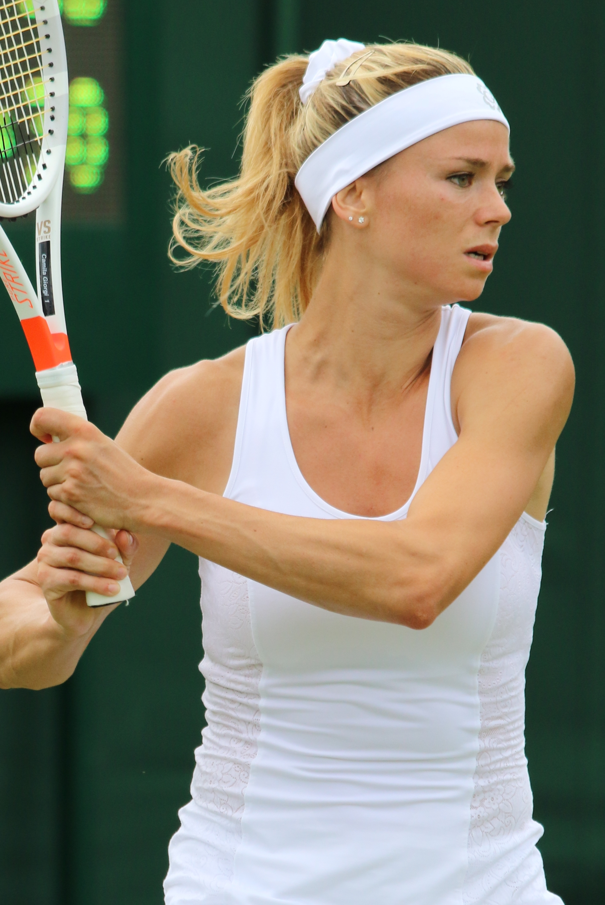 Giorgi WM17 (13)